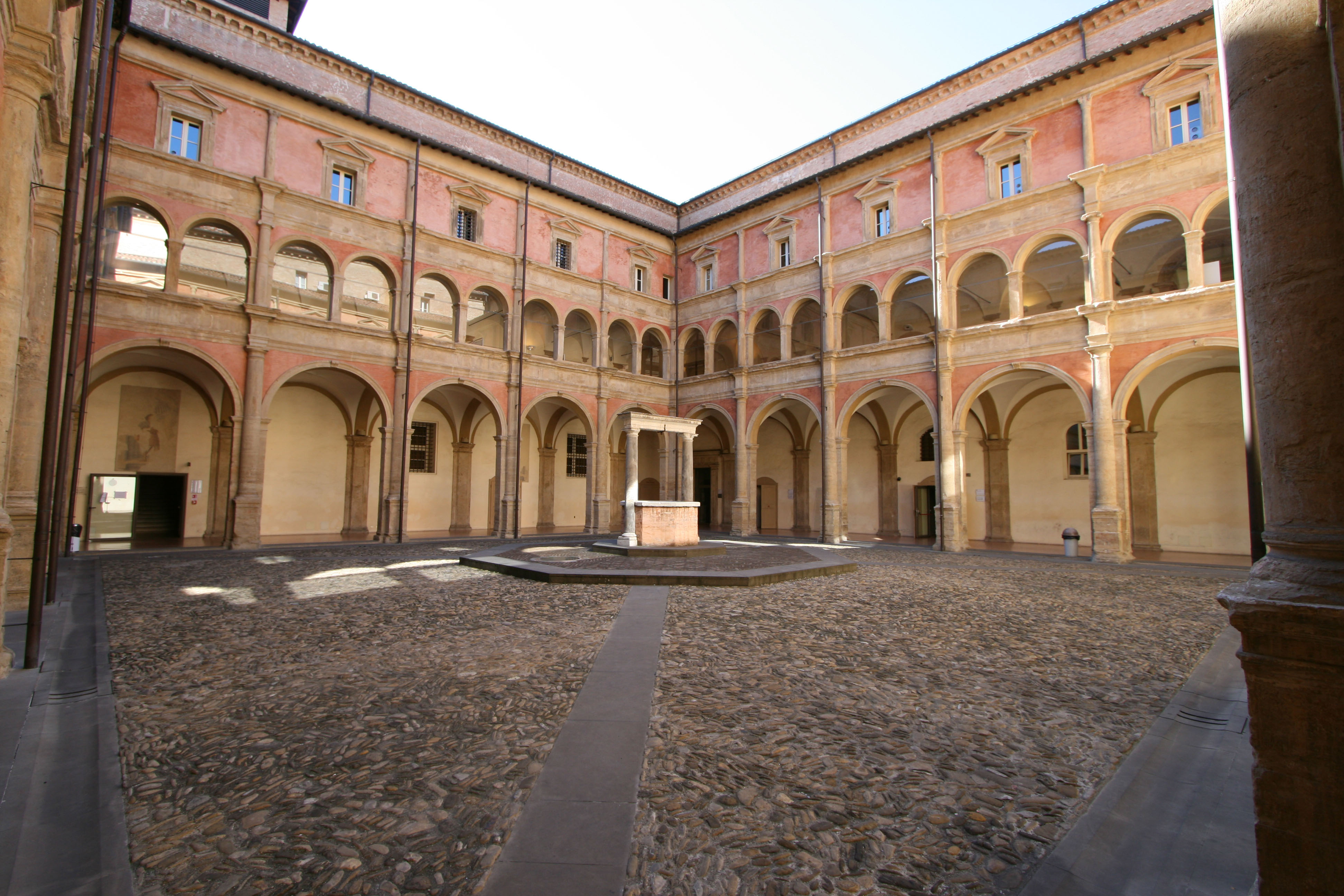 Chiostro di San Giovanni in Monte, già sede del carcere cittadino, ora sede di tre dipartimenti dell'Università di Bologna (Archeologia, Discipline Storiche e Paleografia e Medievistica).